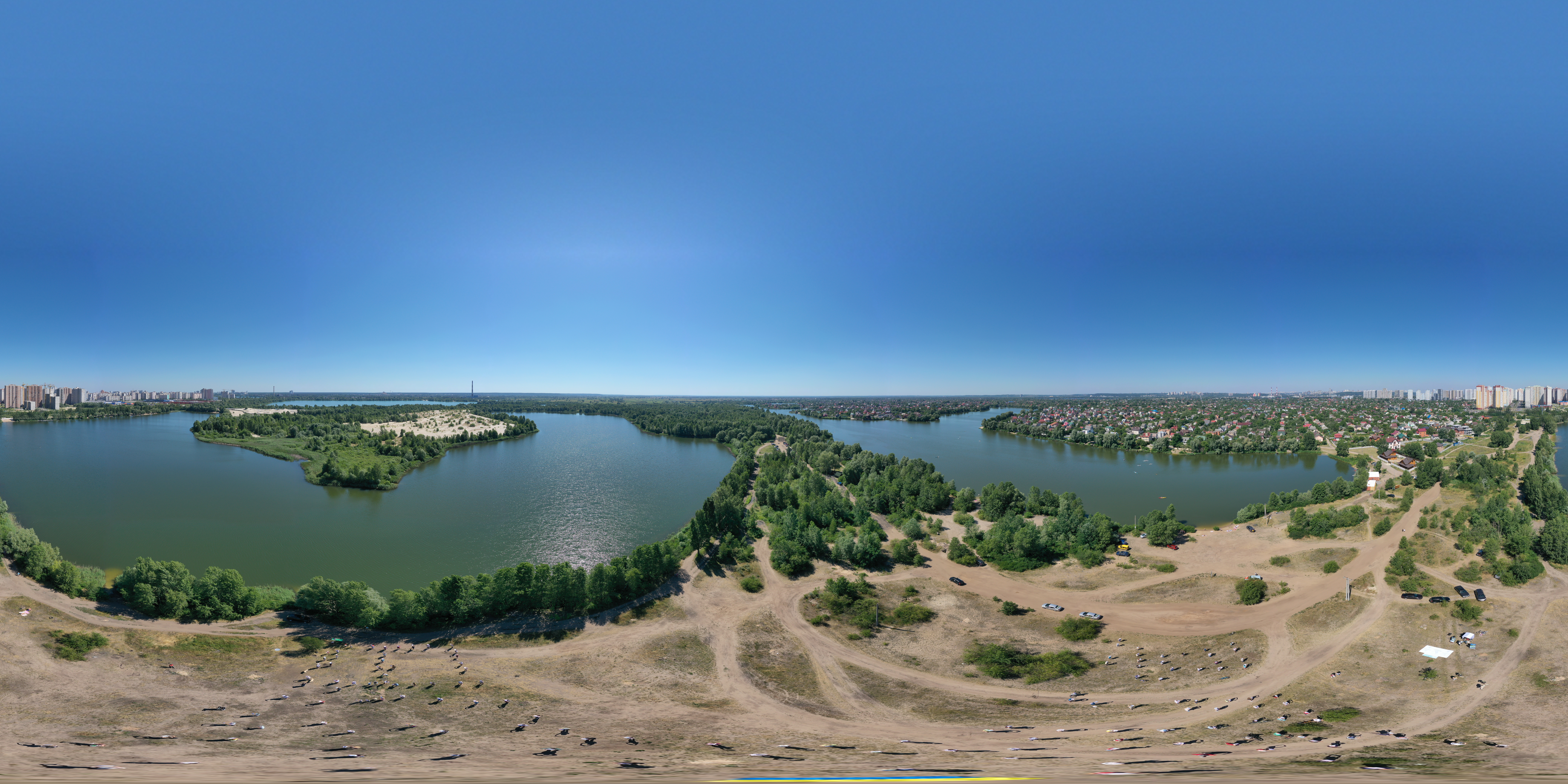 Озера Небреж (слева) и Марытшев (справа), вид с квадрокоптера